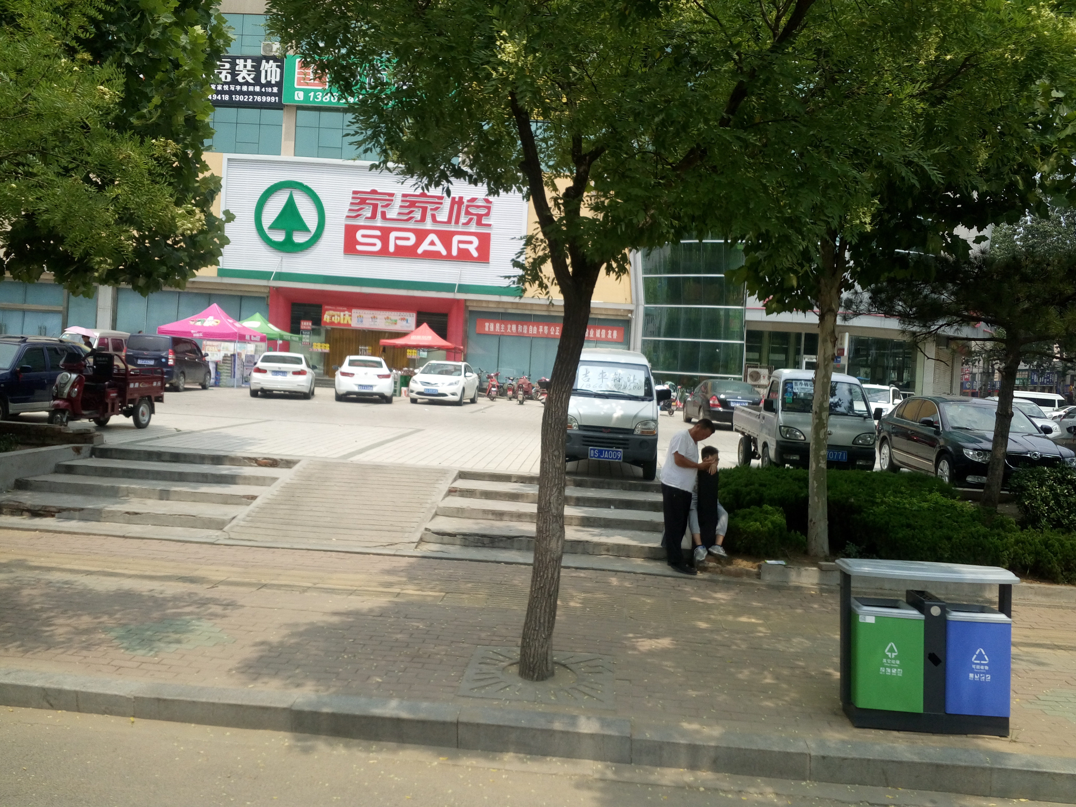 SPAR（家家悦）在中国山东省莱芜市的店